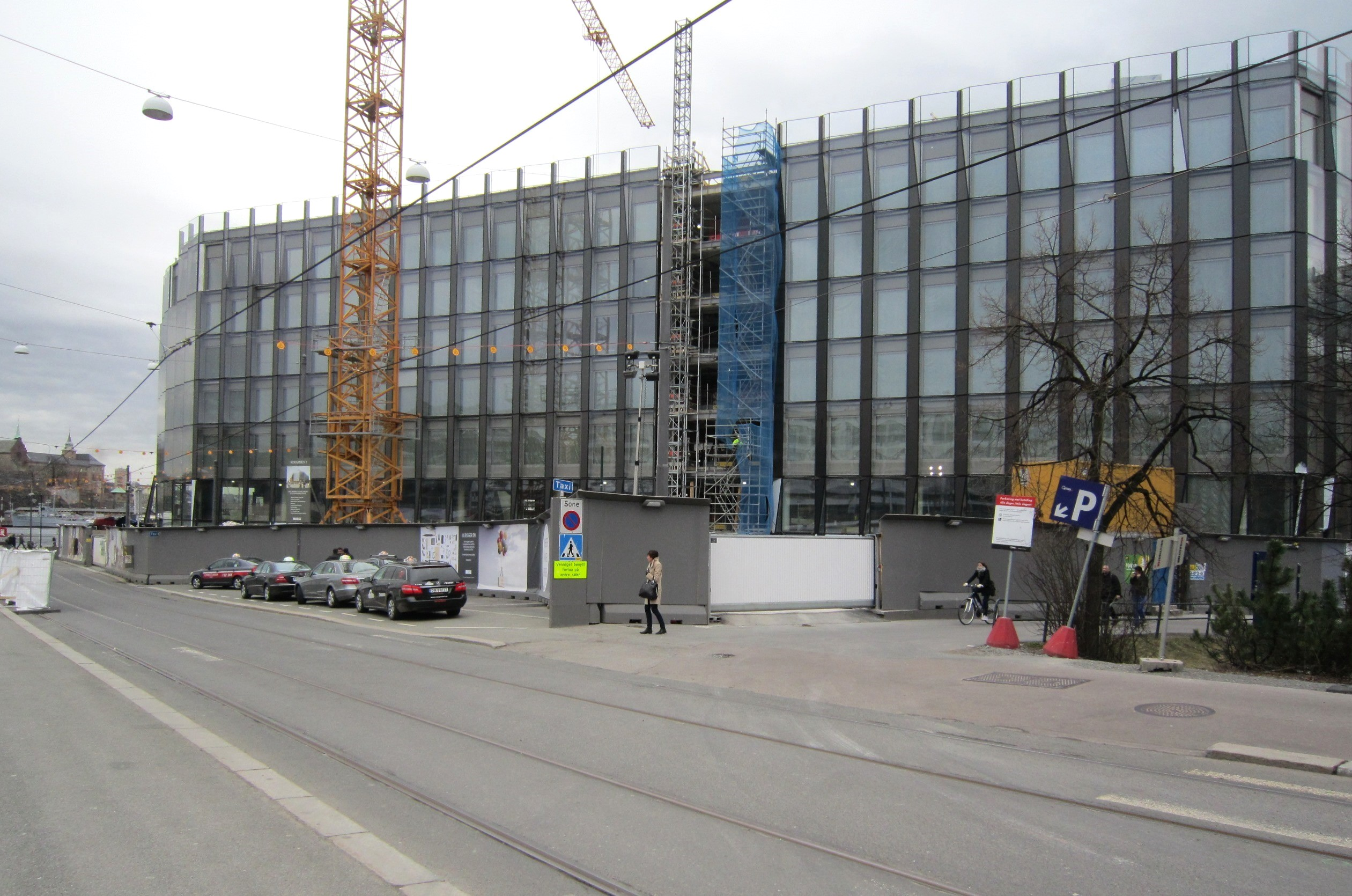 Dokkveien nedover mot Aker brygge